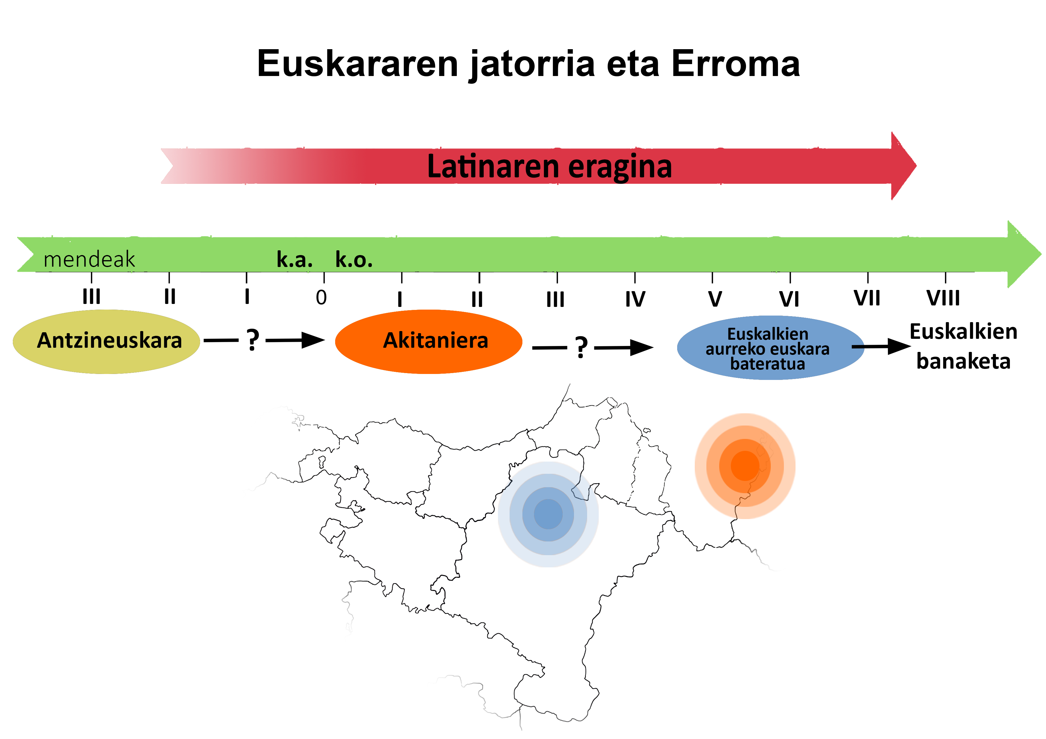 Euskararen jatorria azaltzen duen irudia, baita latinak izandako eragina